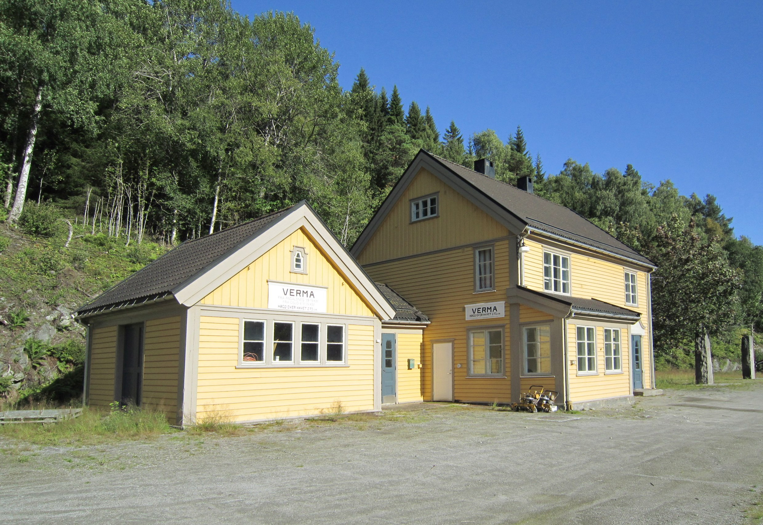 Verma stasjon på Raumabanen